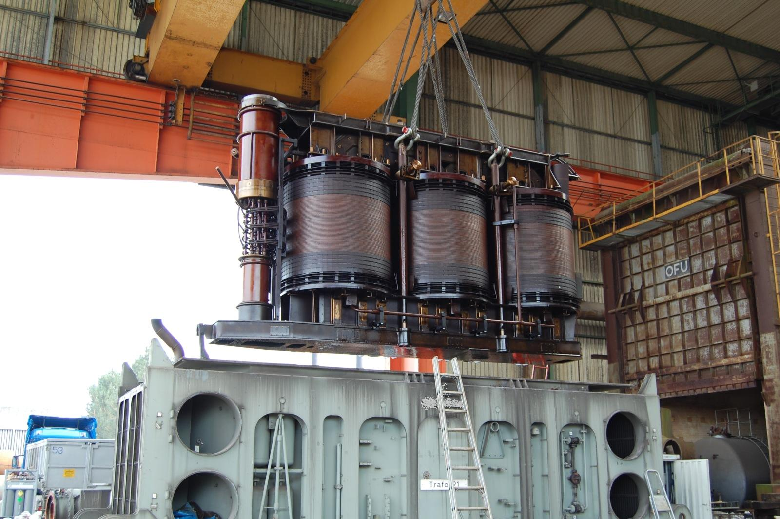 Leistungstransformator bei der Verschrottung. Unten ist der graue Kessel (Tank) zu sehen. Darüber hängt das Aktivteil, welches aus dem Joch, den Wicklungen, den Pressträgern, den Wicklungsableitungen und dem Stufenschalter besteht.